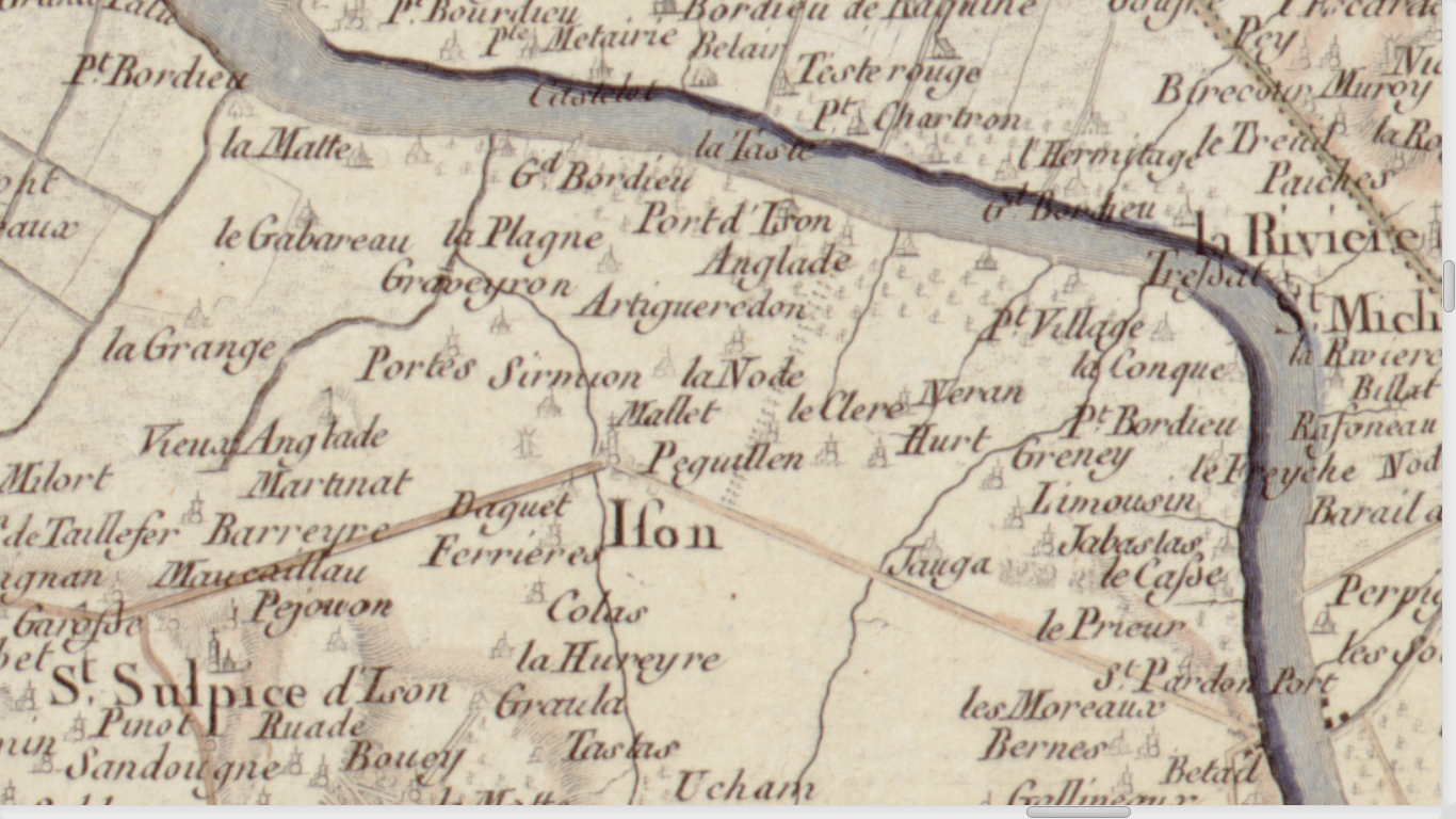 Carte de Cassini n°104, 1756 : zoom sur Ison.